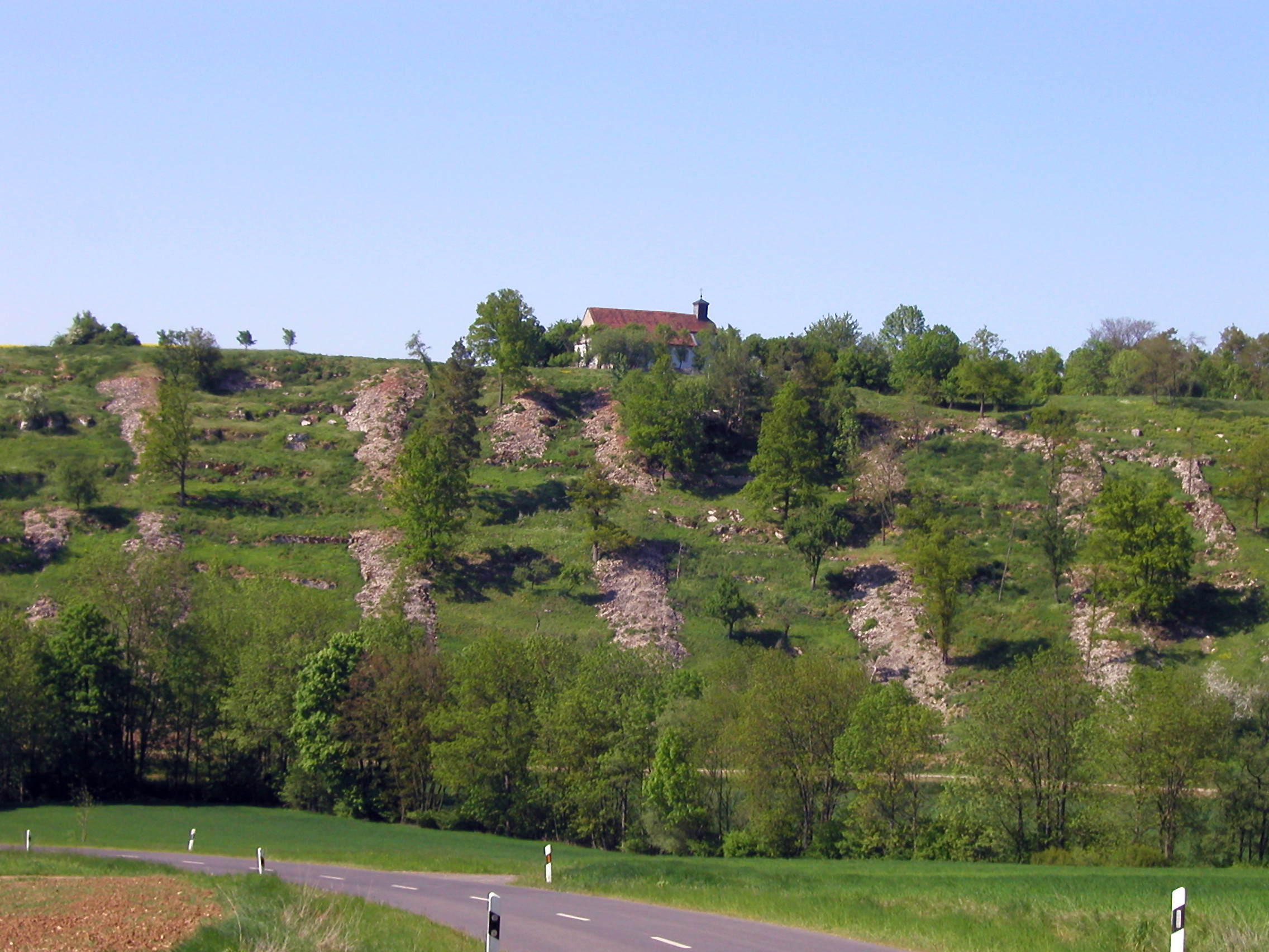 Typisch Landschaftsform der Tauberregion: die Steinriegel